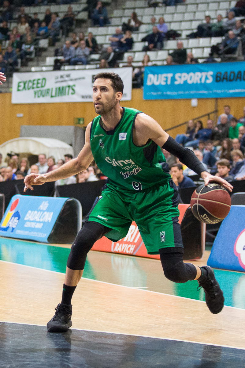 Sergi Vidal en un partido de Liga ACB del Club Joventut Badalona de la temporada 2017-18.